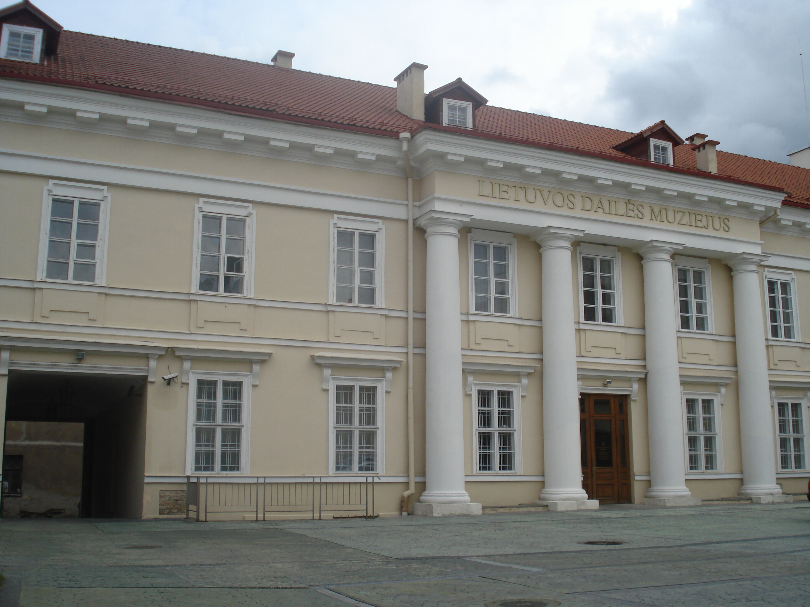 Lithuanian Art Museum (Didžioji g. 4 / Bokšto g. 5, Vilnius). Main building